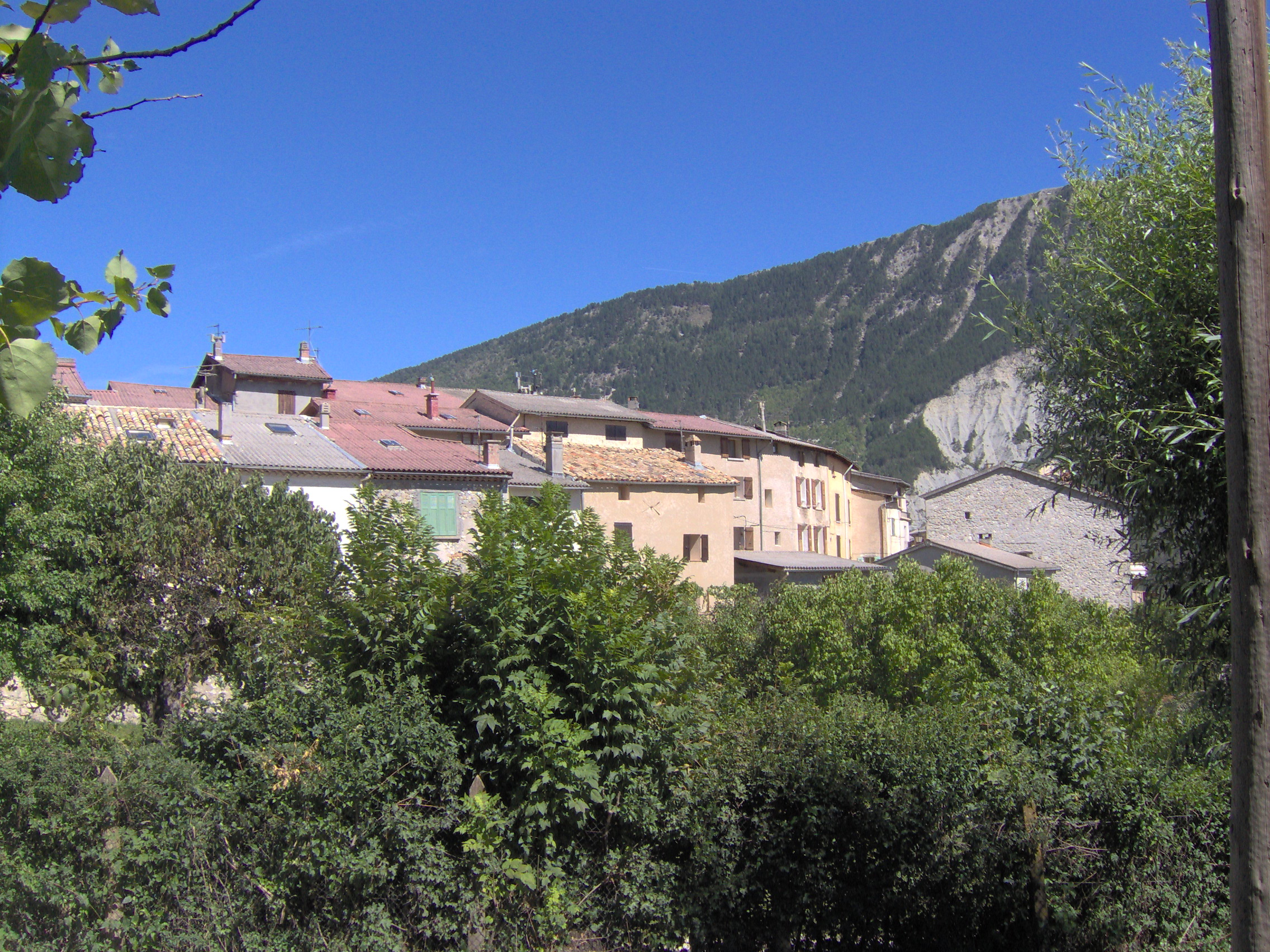 Vue du village de La Mure-Argens